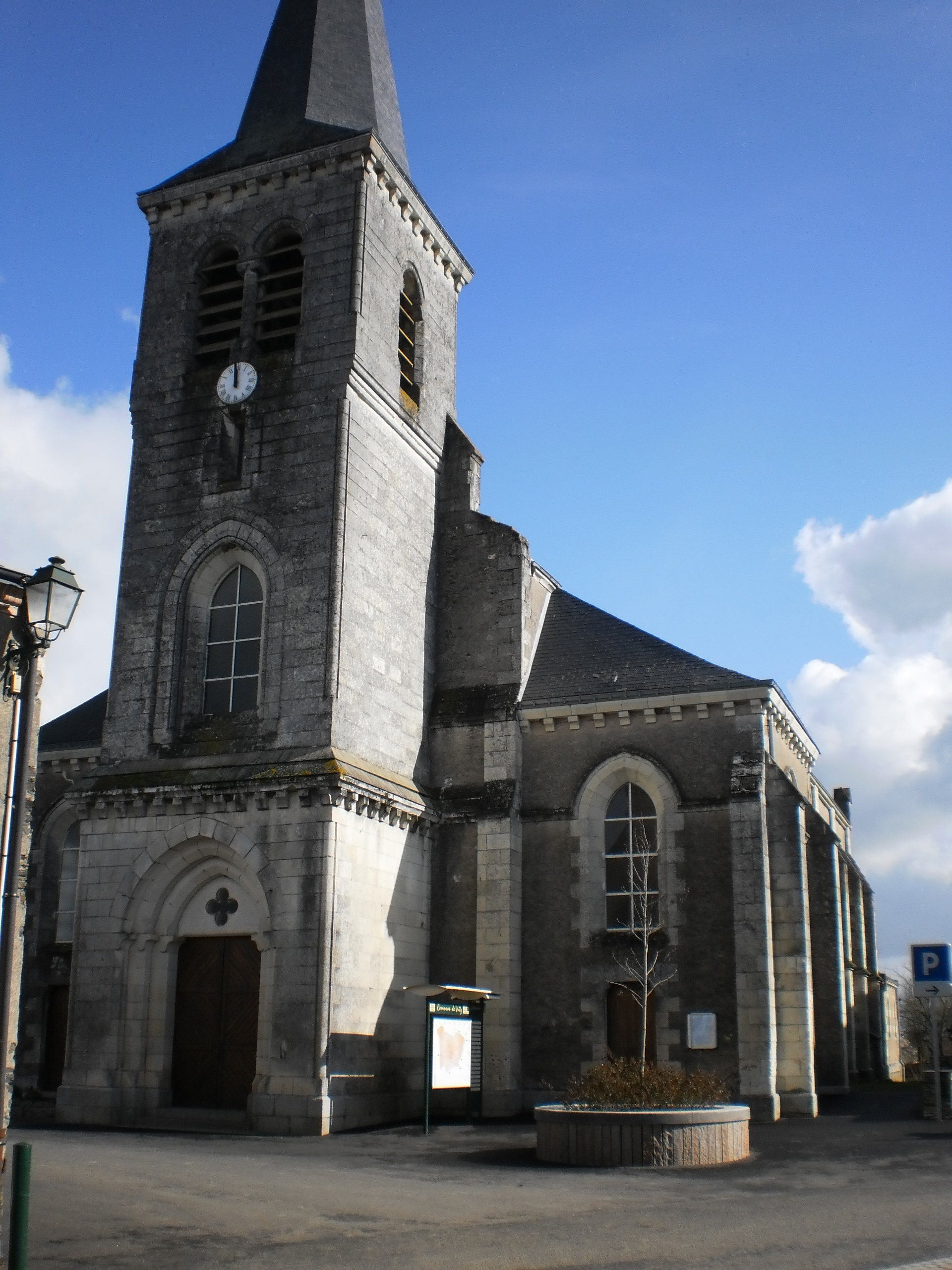 Vritz (Loire-Atlantique, France) - église